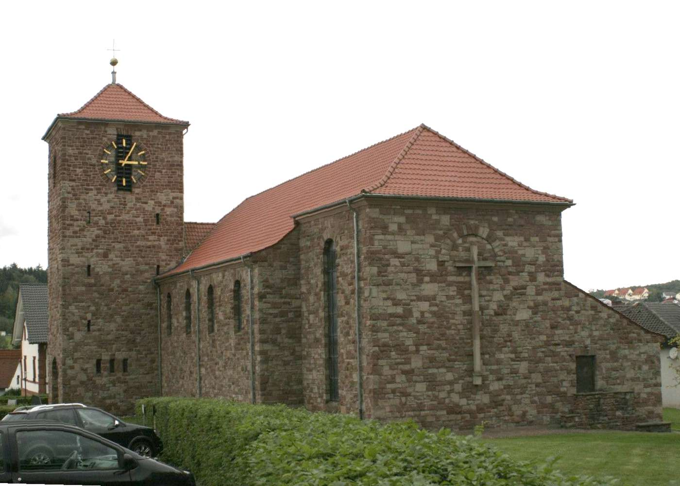 Katholische Kirche St. Michael, Bechhofen/Pfalz